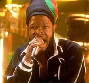 Bongo Maffin Band, Kwaito Südafrika, Frontman Appleseed